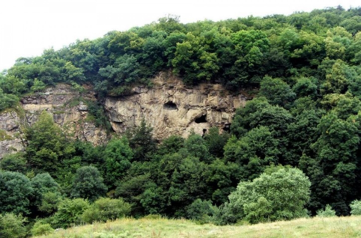 Пещера Арсена рядом с поселком Манглиси